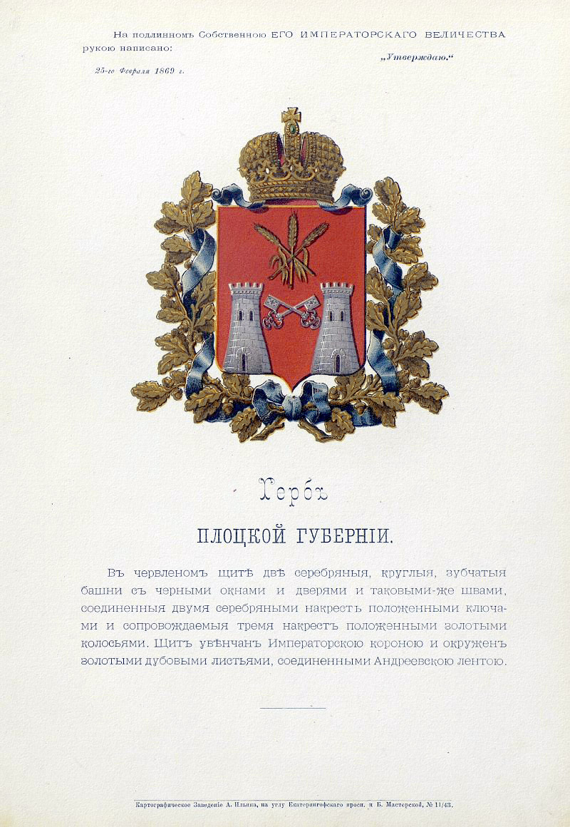 Official Russian Empire coat of arms Plotsk Governorate. Герб Российской Империи Плоцкой губернии с официальным описанием в Гербовнике Бенке. Утверждён Императором Всероссийским Александром Вторым.